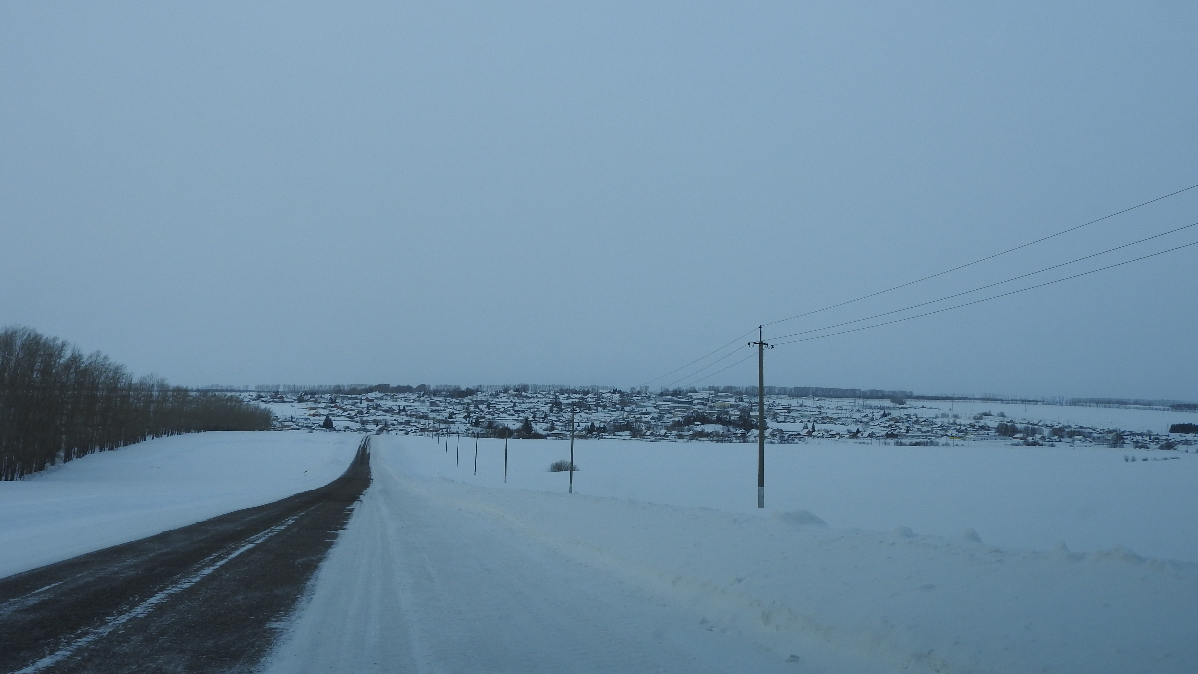 Башҡортса: Ҡырмыҫҡалы ауылы